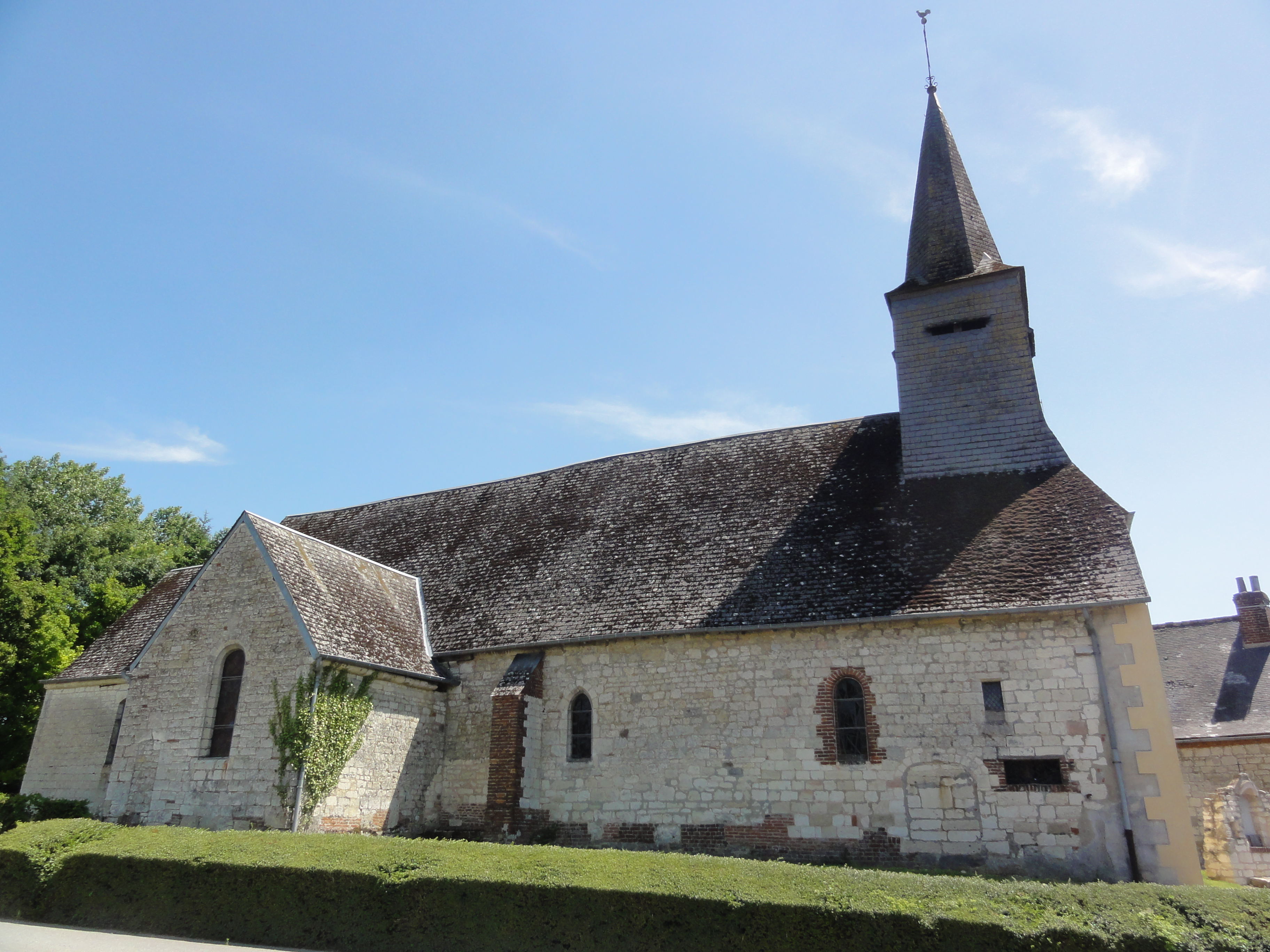 Housset (Aisne) église